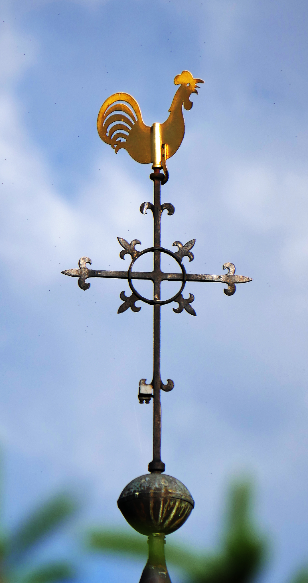 Wetterhahn der ehemaligen Kirche St. Germanus in Trier-Feyen